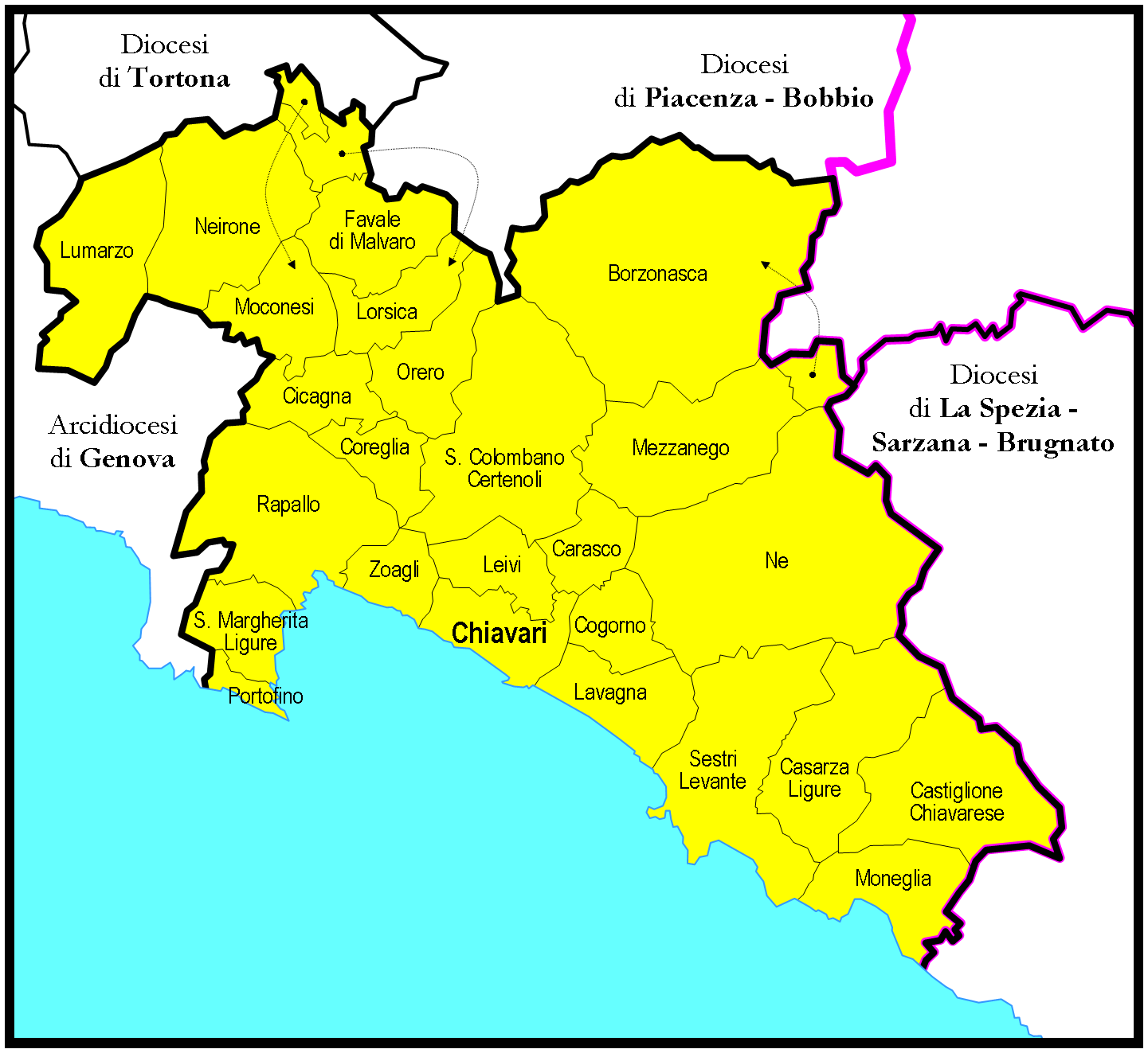 Mappa della Diocesi di Chiavari